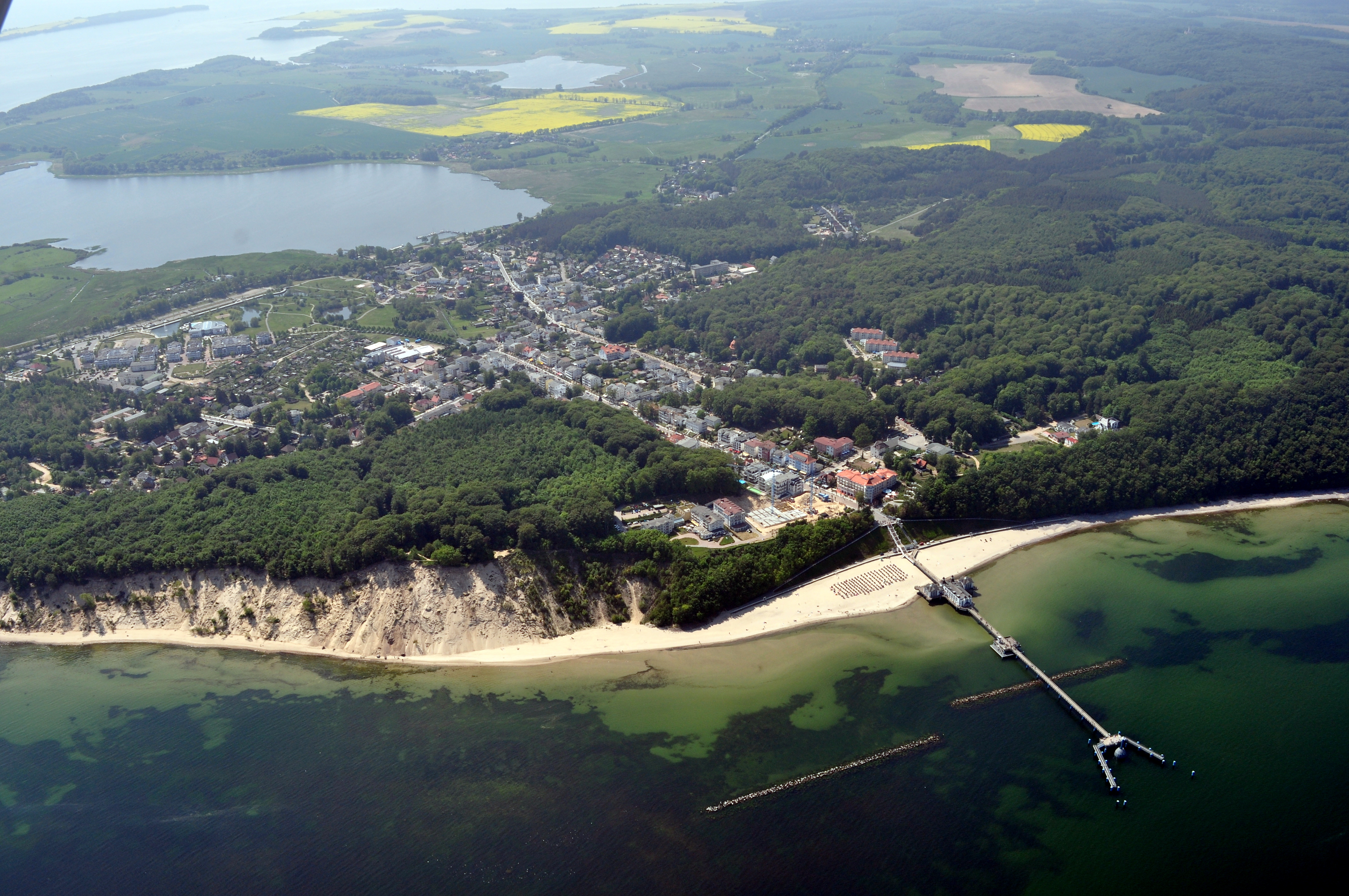 Die Bilder wurden von mir während eines einstündigen Rundflugs ab Flugplatz Güttin am 21. Mai 2011 aufgenommen. Die Bildbeschreibung steht im Dateinamen. Aufgenommen mit einer Nikon D5000 durch das Seitenfenster des Flugzeugs.